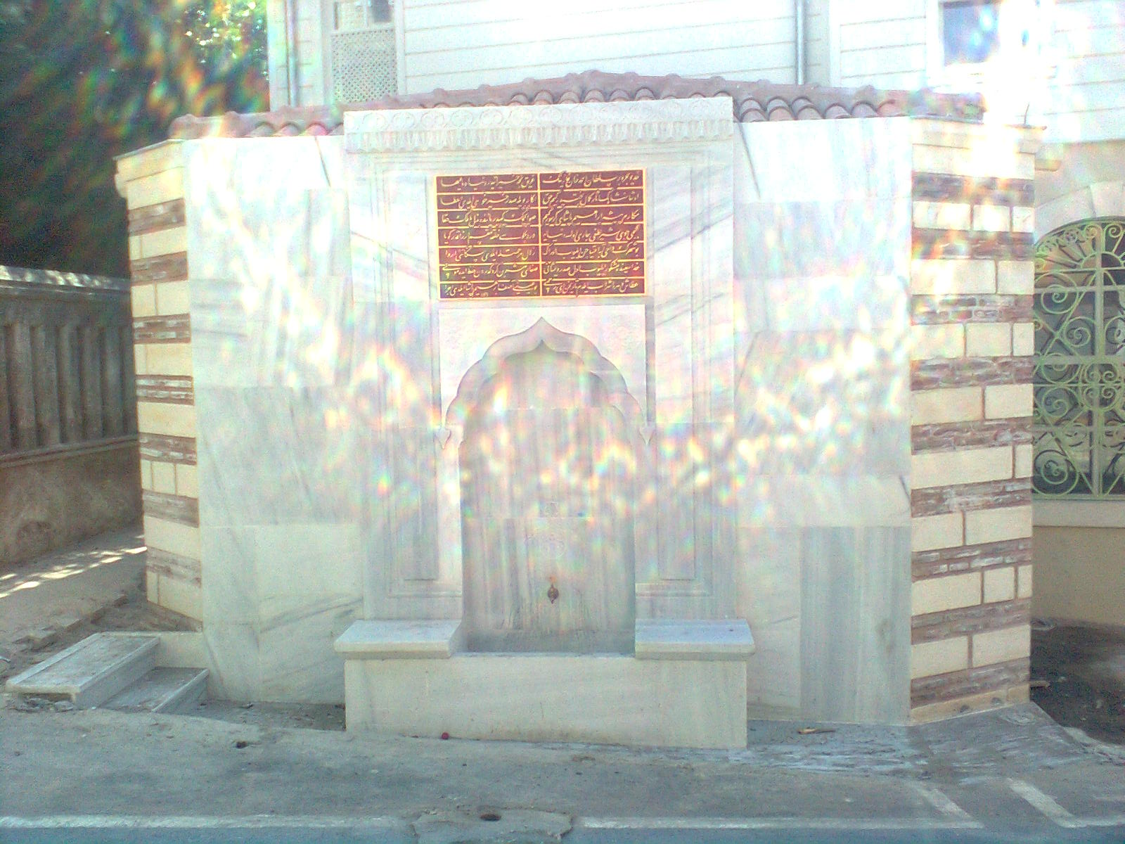 Nevşehirli Damat İbrahim Paşa Çeşmesi, 1728 yılında III. Ahmet'in sadrazamı Nevşehirli Damat İbrahim Paşa tarafından, İskender Baba Tekkesi'nin yanına yaptırılmıştır.